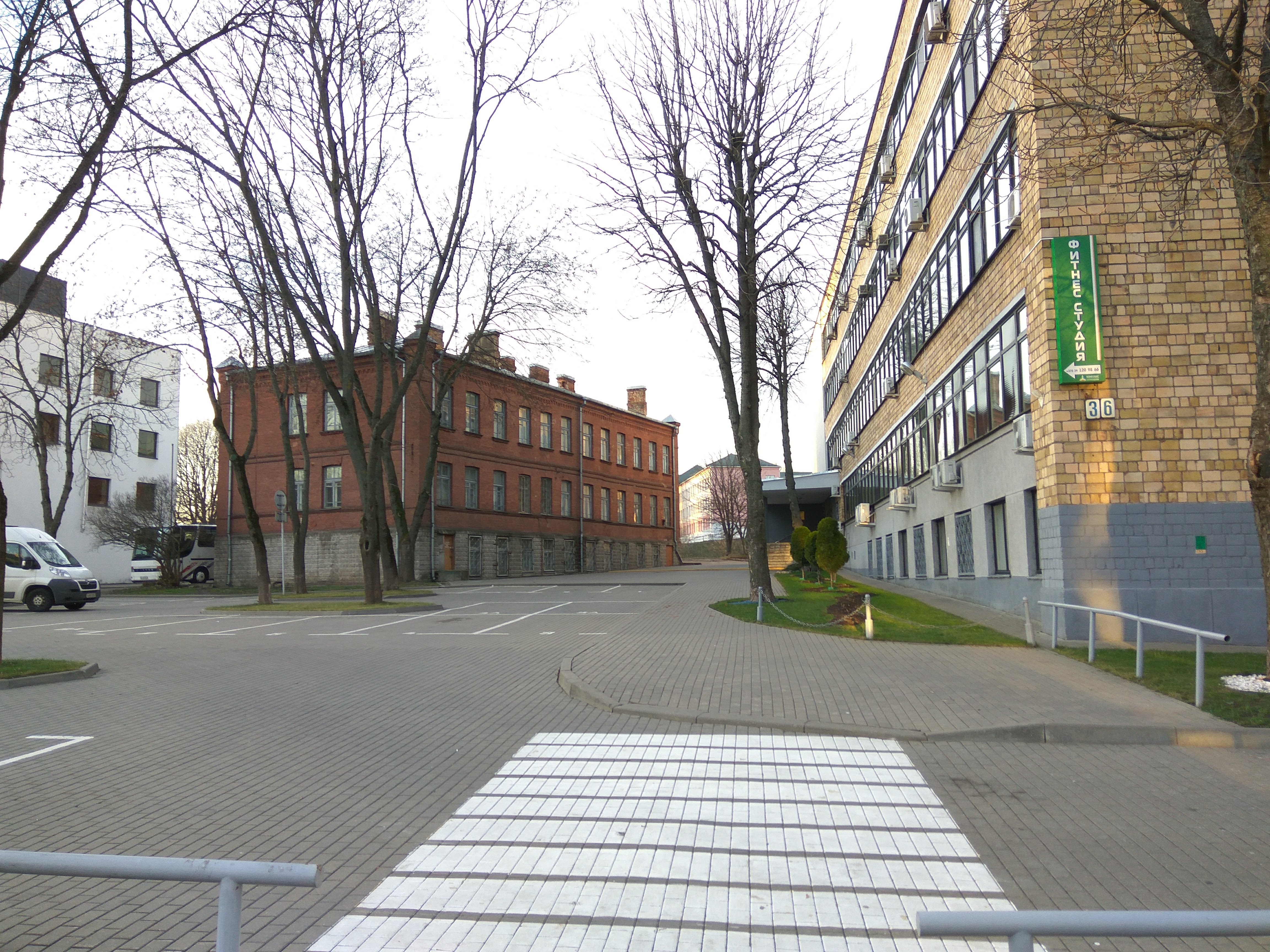 Мінск. Вечаровая вуліца Мяснікова